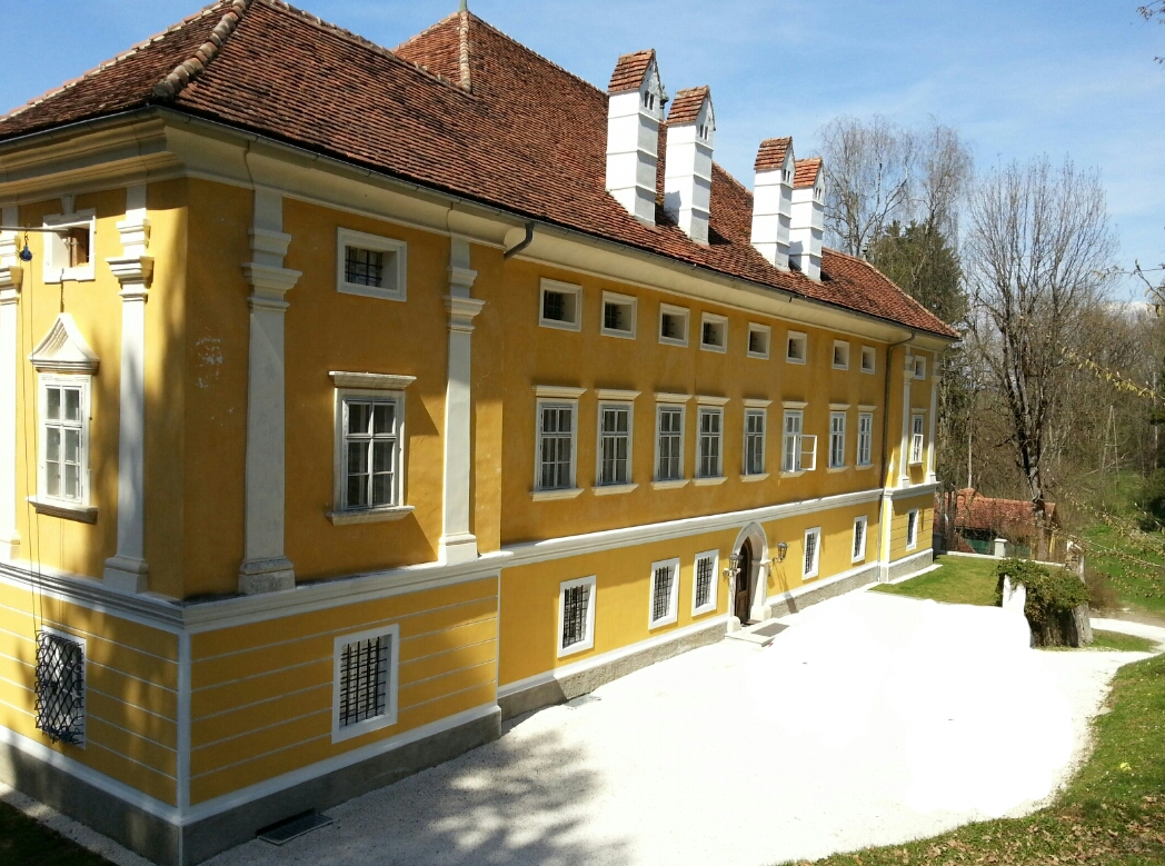 Schloss Stadlhof Rückansicht im Jahr 2013